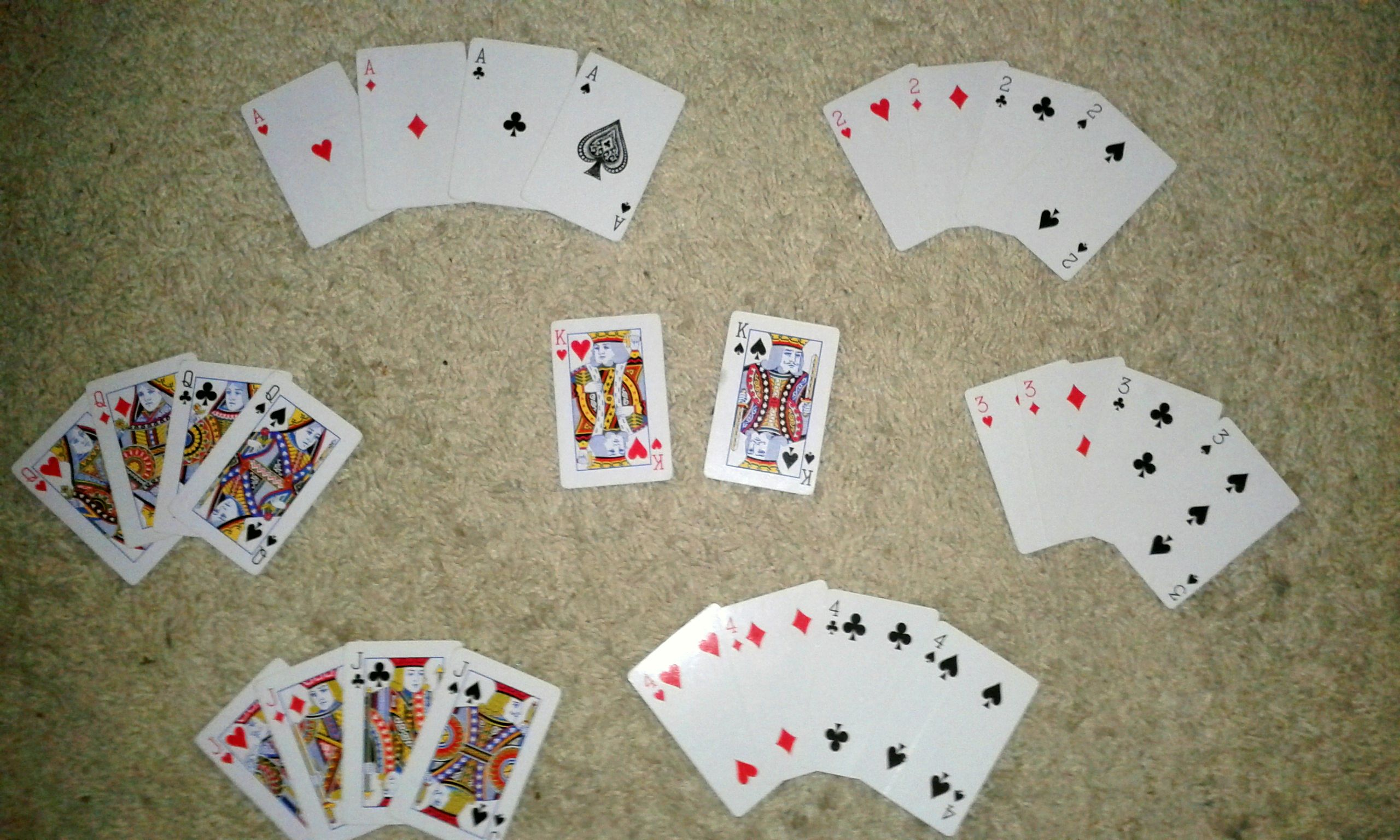 Karty funkcyjne w grze makao: asy, 2, 3, 4, walety, damy, król kier i król pik